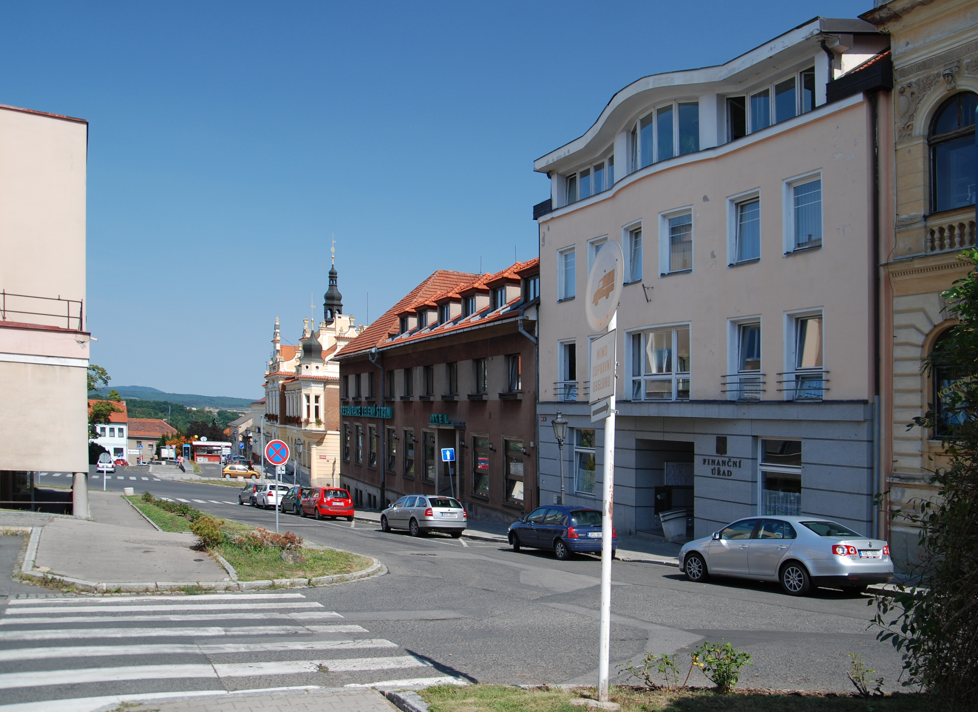 POhled na náměstí svrchu